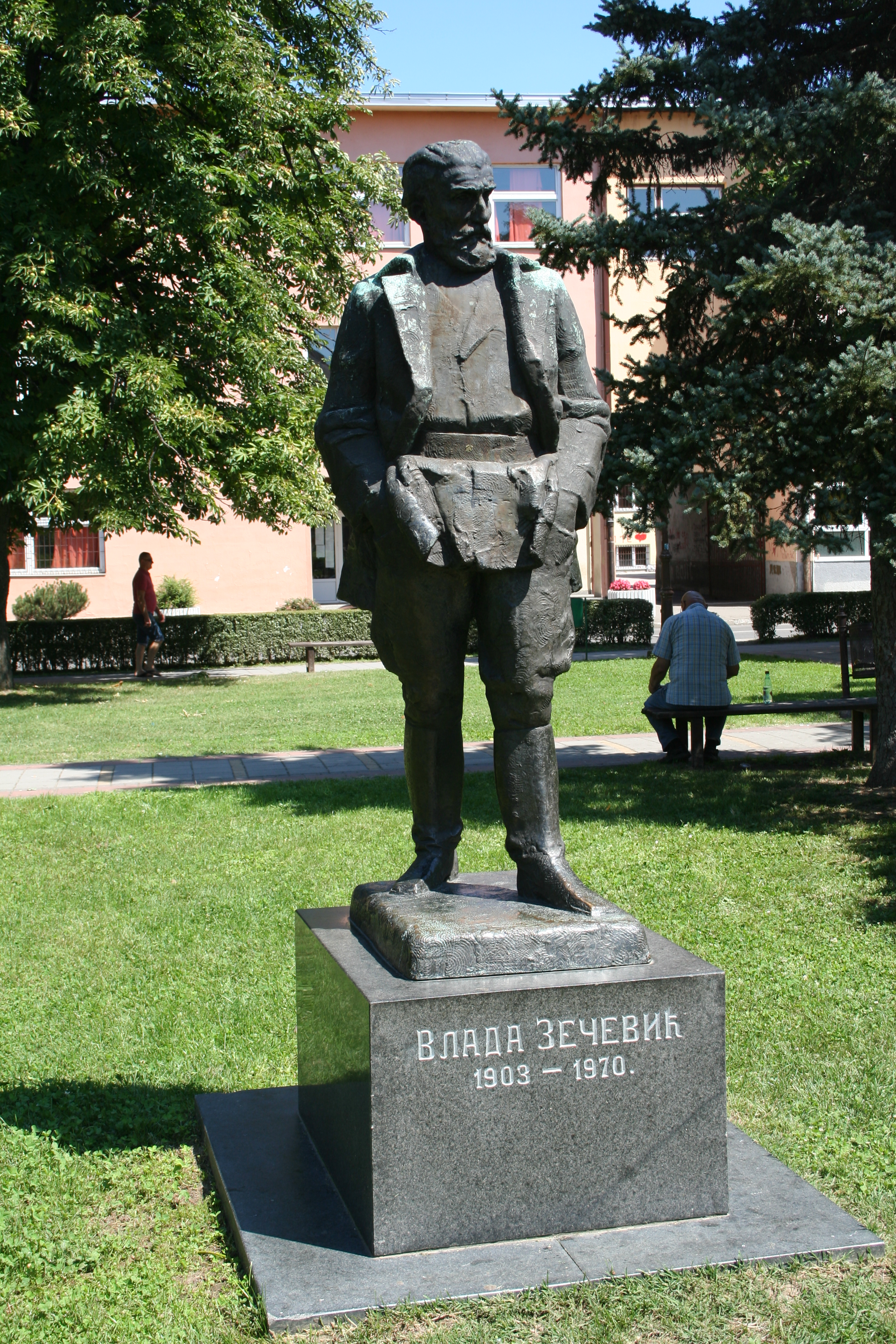 Spomenik popu Vladi Zečeviću, Loznica